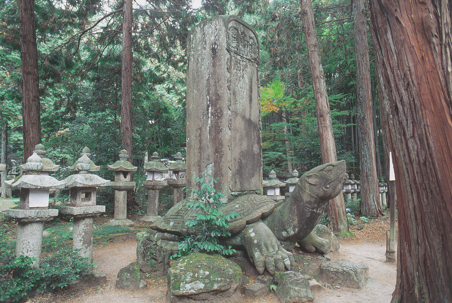 Gesshouji Temple in Matsue City - 松江市の月照寺